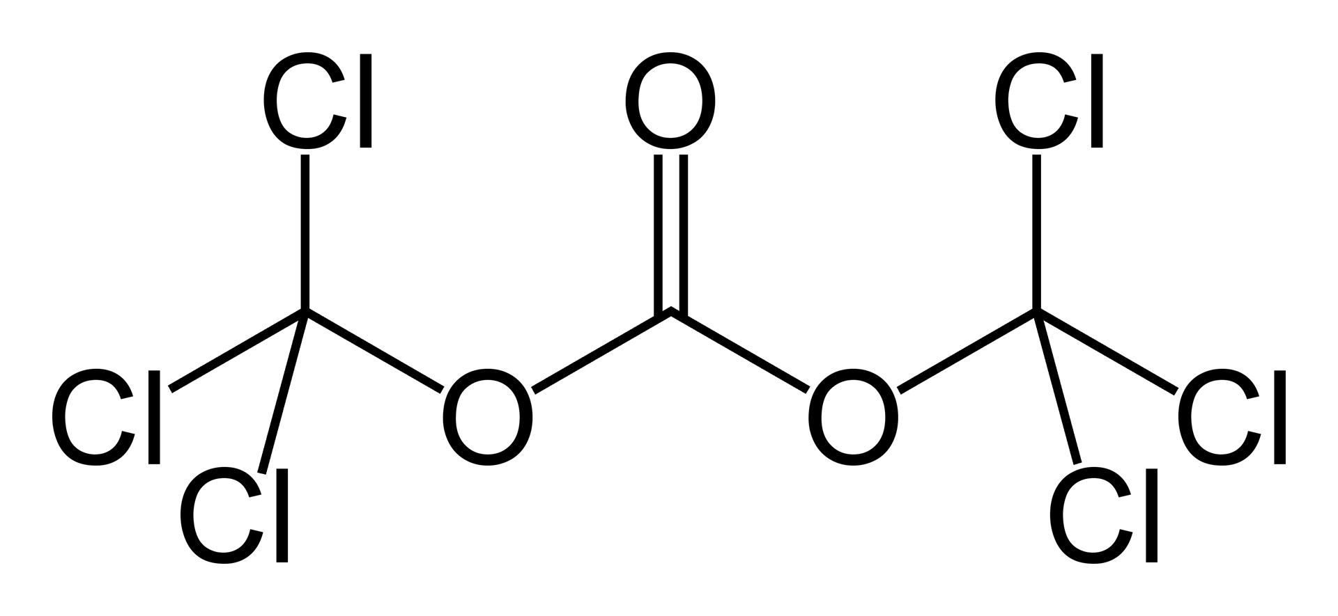 Triphosgene-skeletal